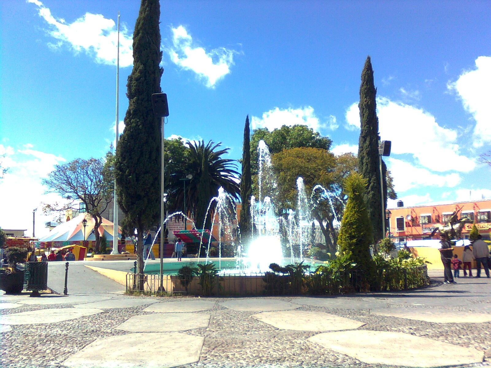 Fuente en el zócalo de Zacatelco.